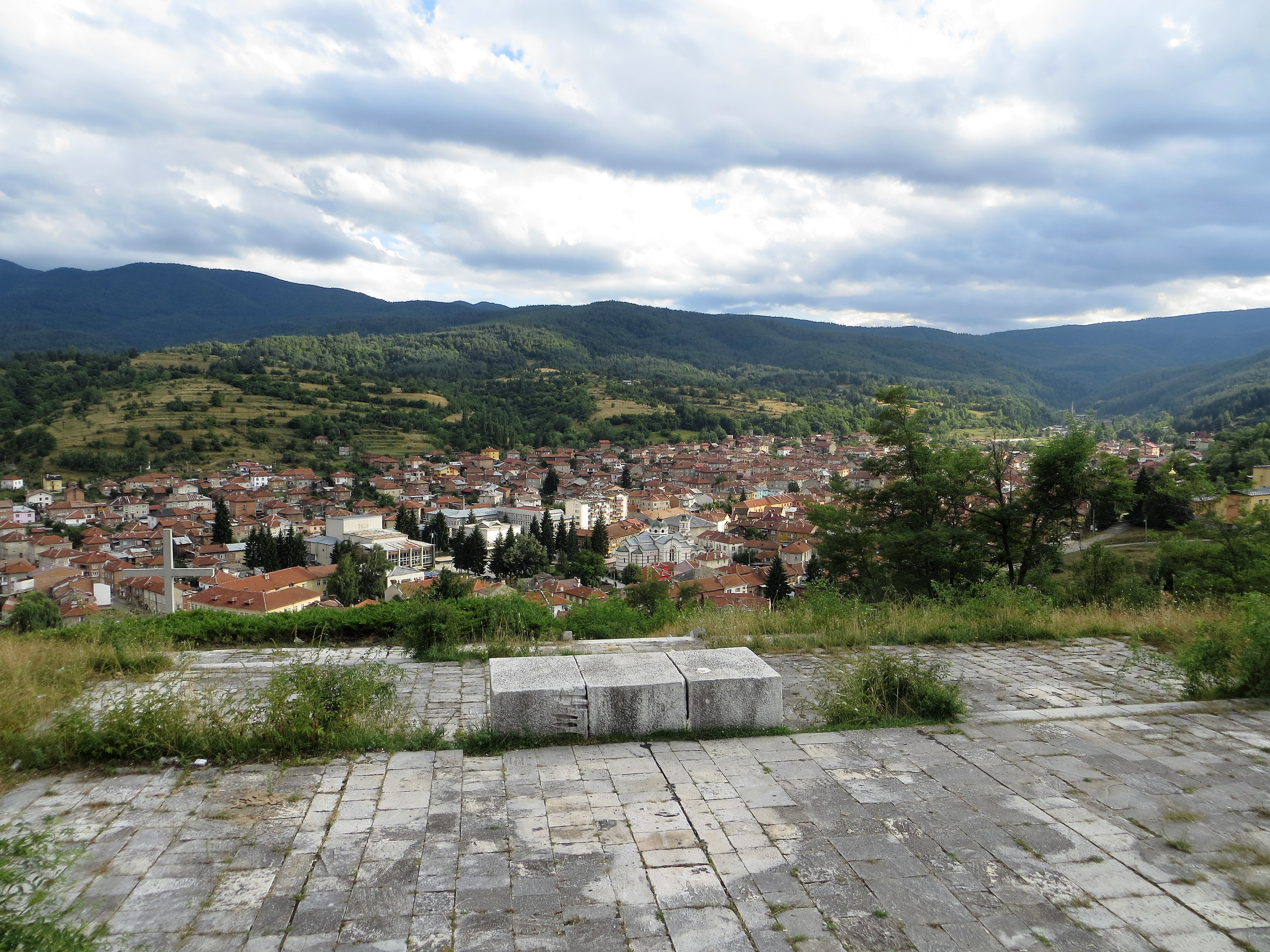 Историческа църква-костница "Света Неделя"